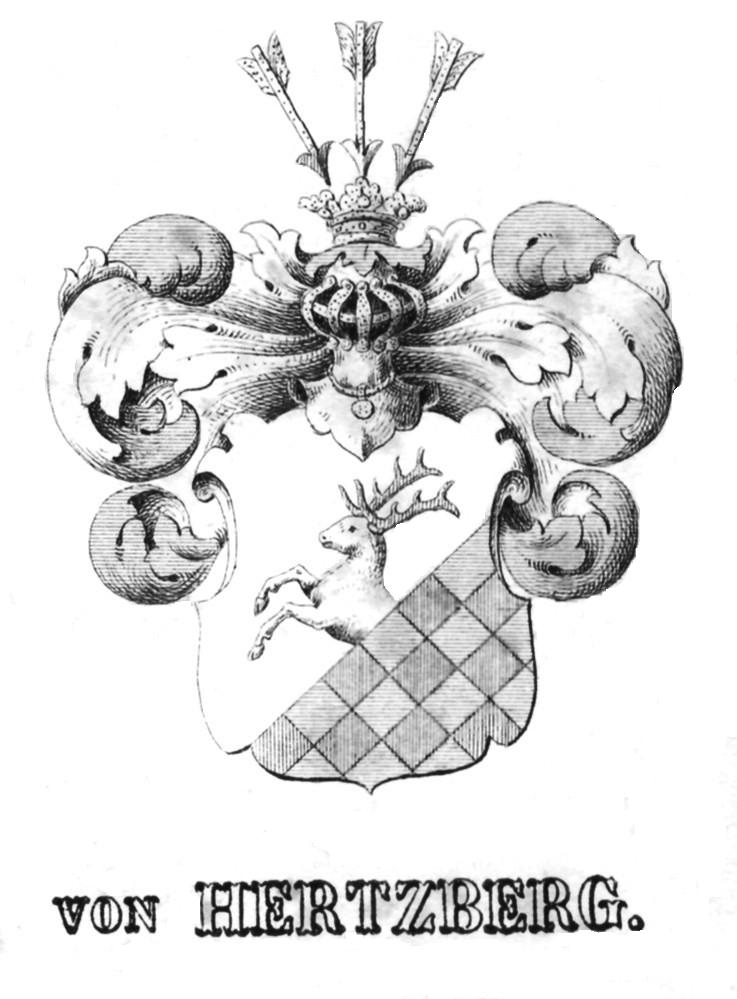 Wappen der Familie von Hertzberg.